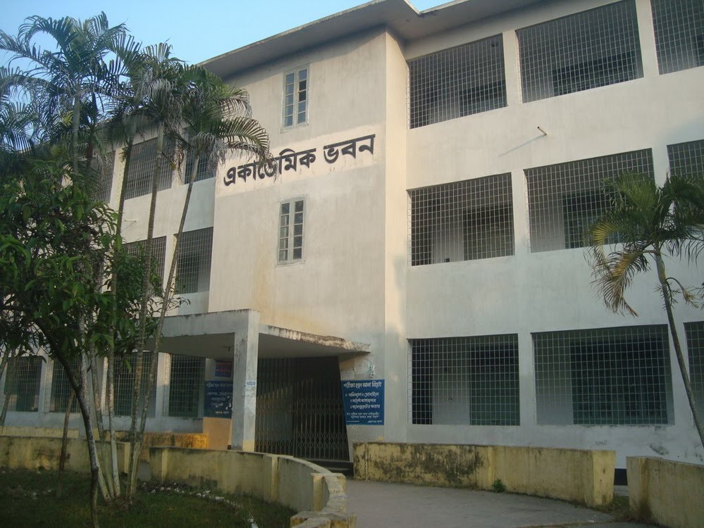 ফরিদপুর পলিটেকনিক ইনস্টিটিউট একাডেমিক ভবন